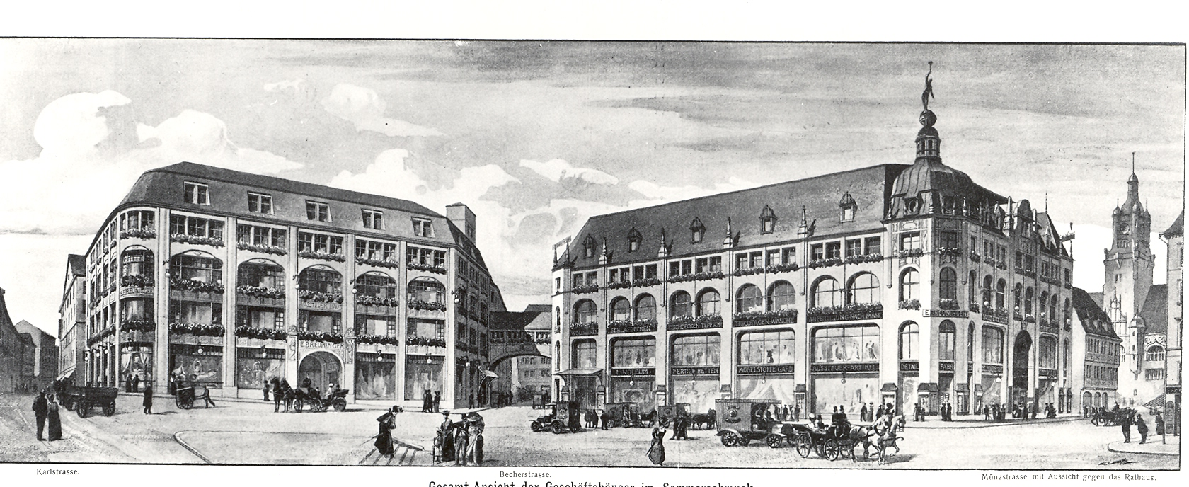 Открытие второго магазина "Бройнингер", 1908 год